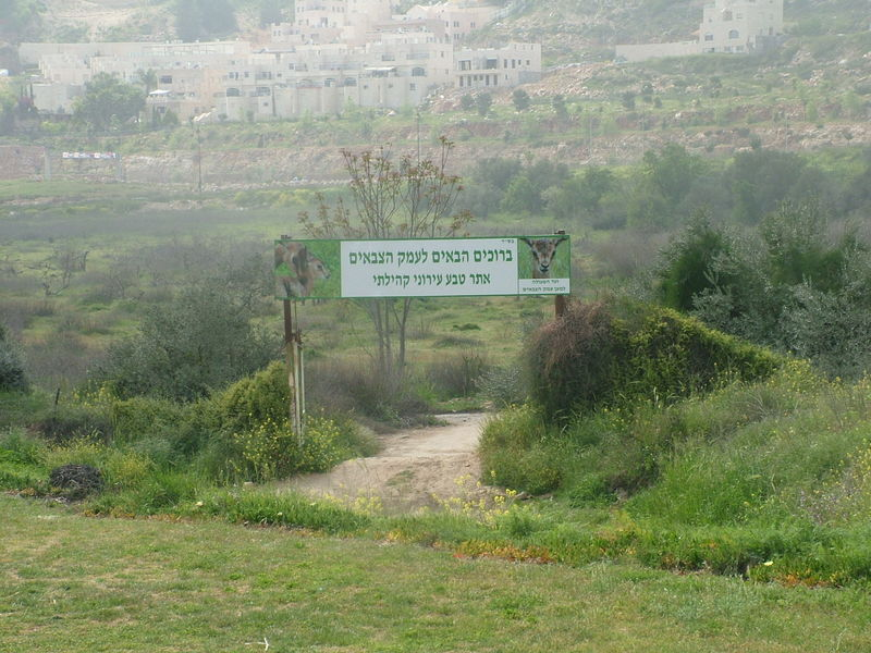 עמק הצבאים